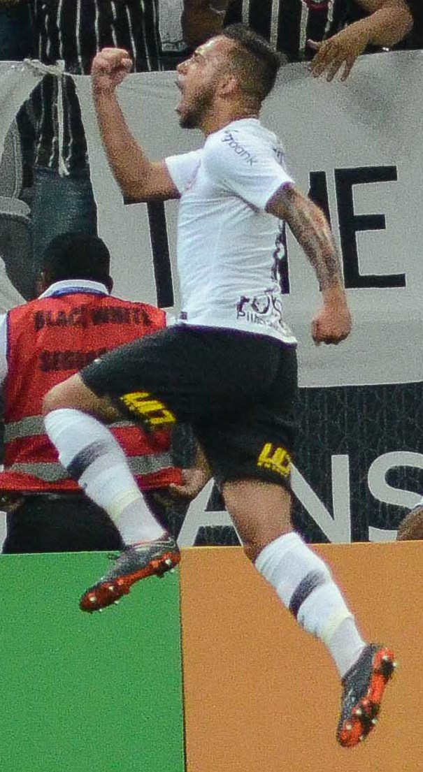 Partida valida pela oitavas de final da copa do brasil 2018